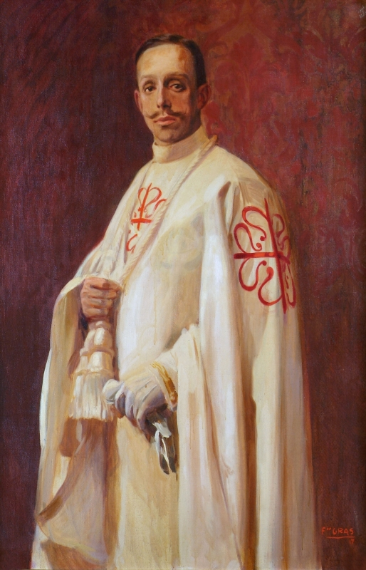 Retrato del rey Alfonso XIII de España (1886-1941), vestido con el hábito de la Orden de Calatrava.